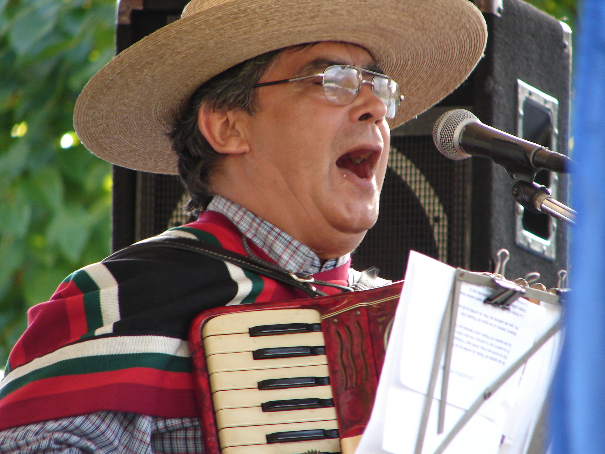 Celebraciones de las Fiestas Patrias, Chilefiestas patrias chilenas